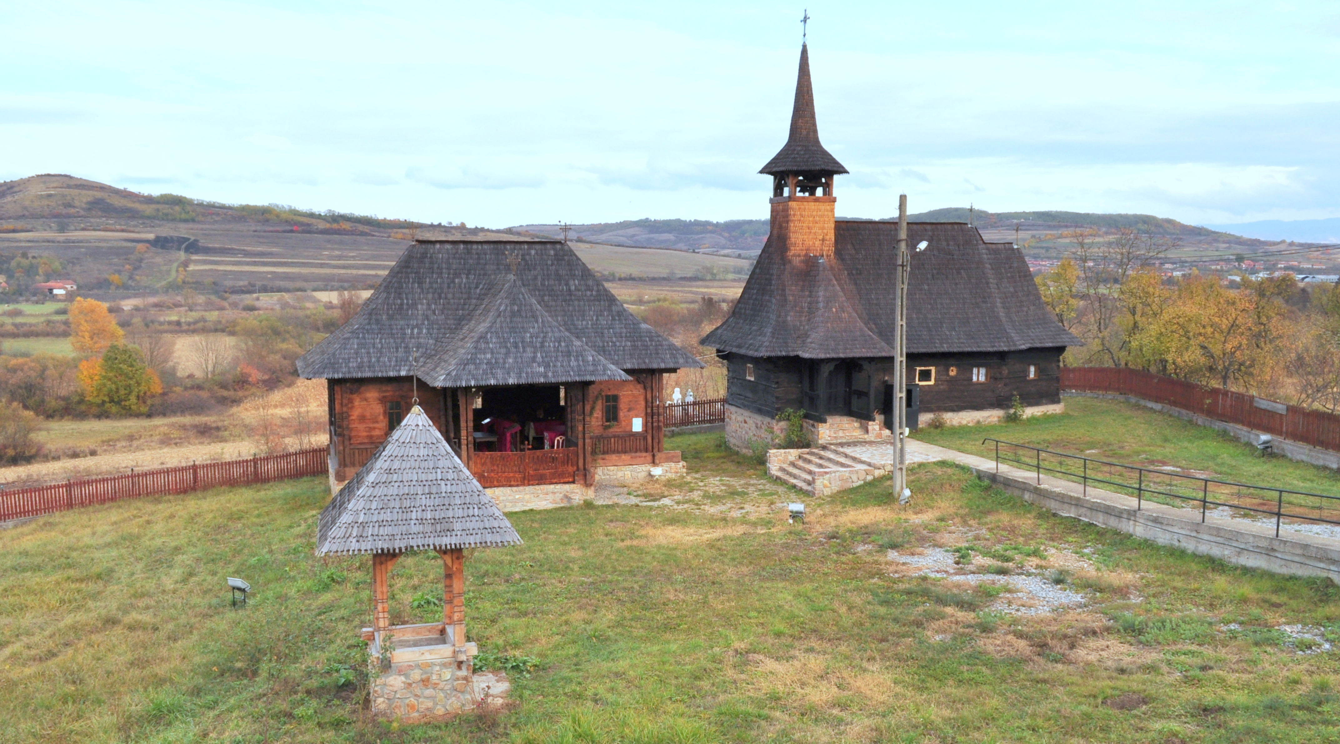 Biserica de lemn „Sf. Teodor Tiron" din Brătești, județul Bihor